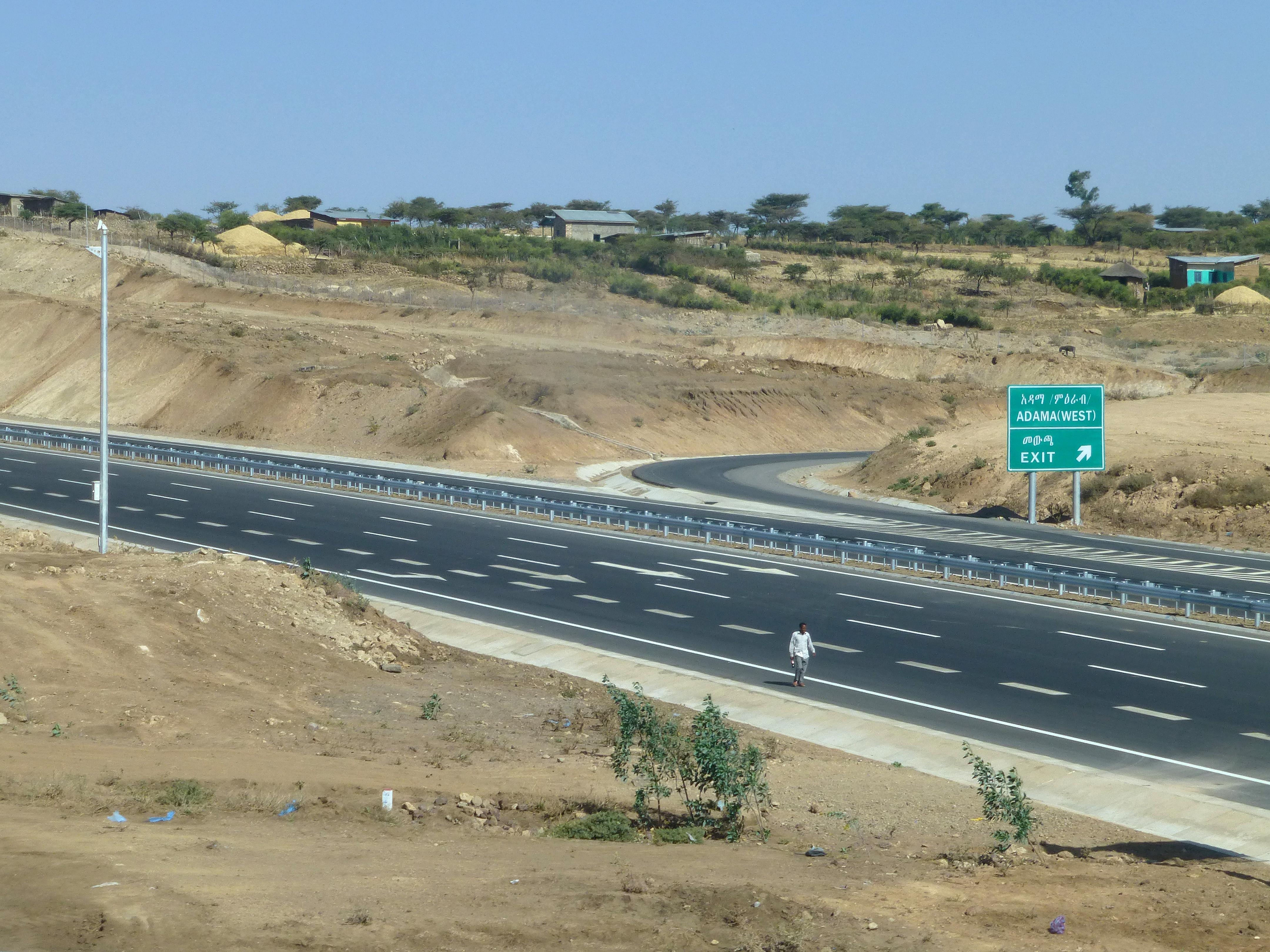 Adama (Oromia, Ethiopie) : sortie d'autoroute